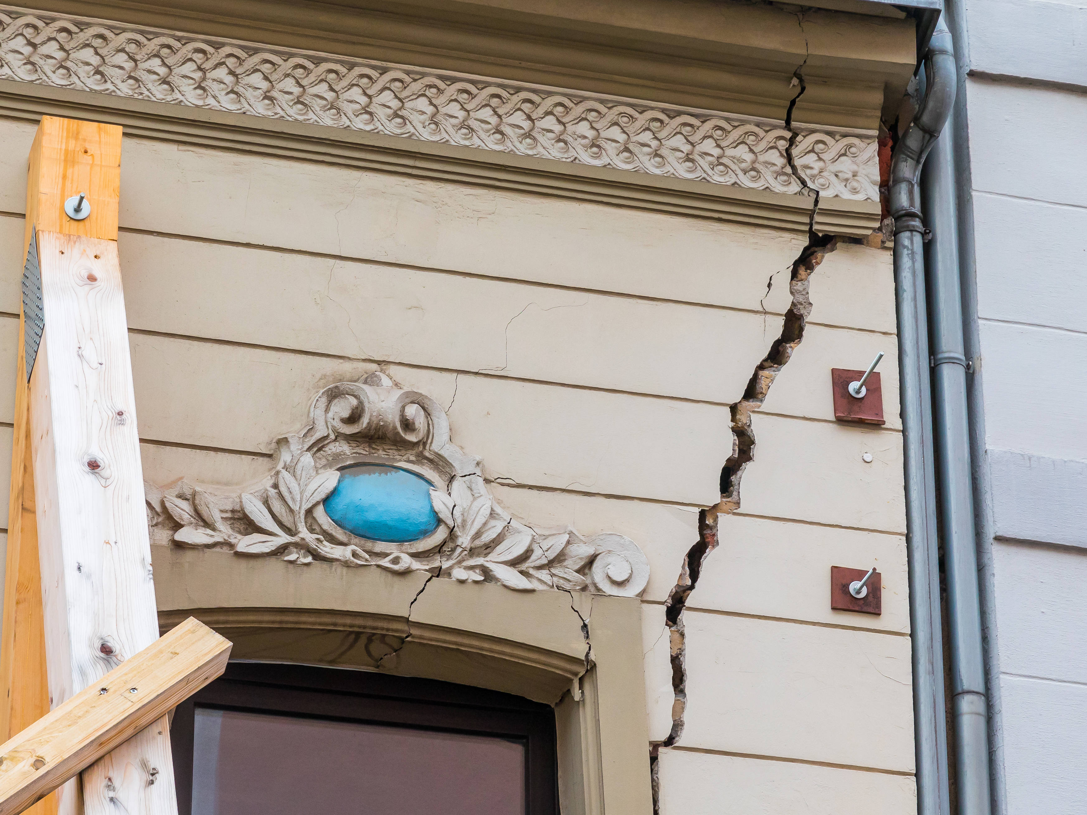 Wohn- und Geschäftshaus Hansemannstraße 2, Köln-Ehrenfeld